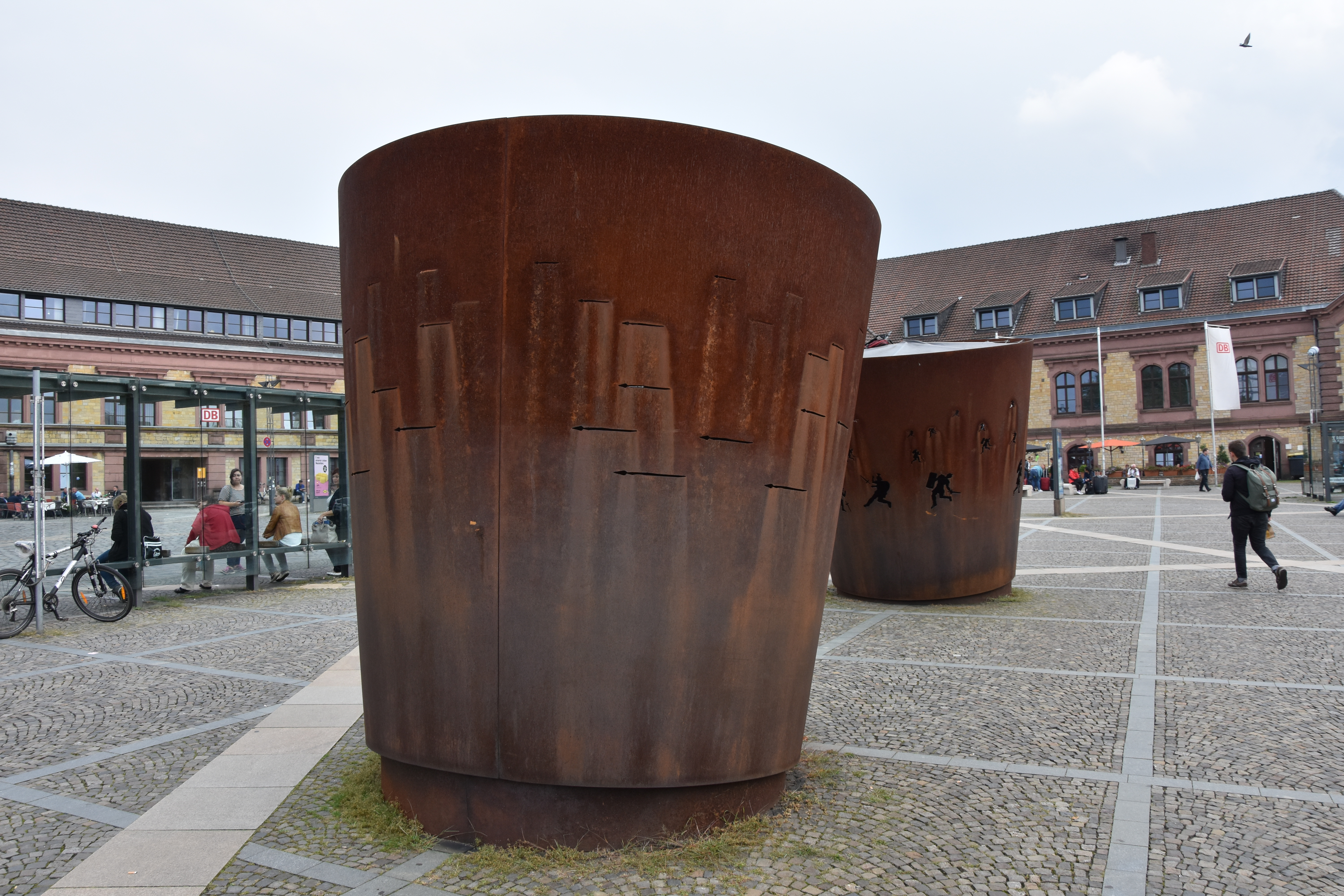 Battle Drums Kunstwerk von Dennis Oppenheim am Bahnhof Osnabrück.